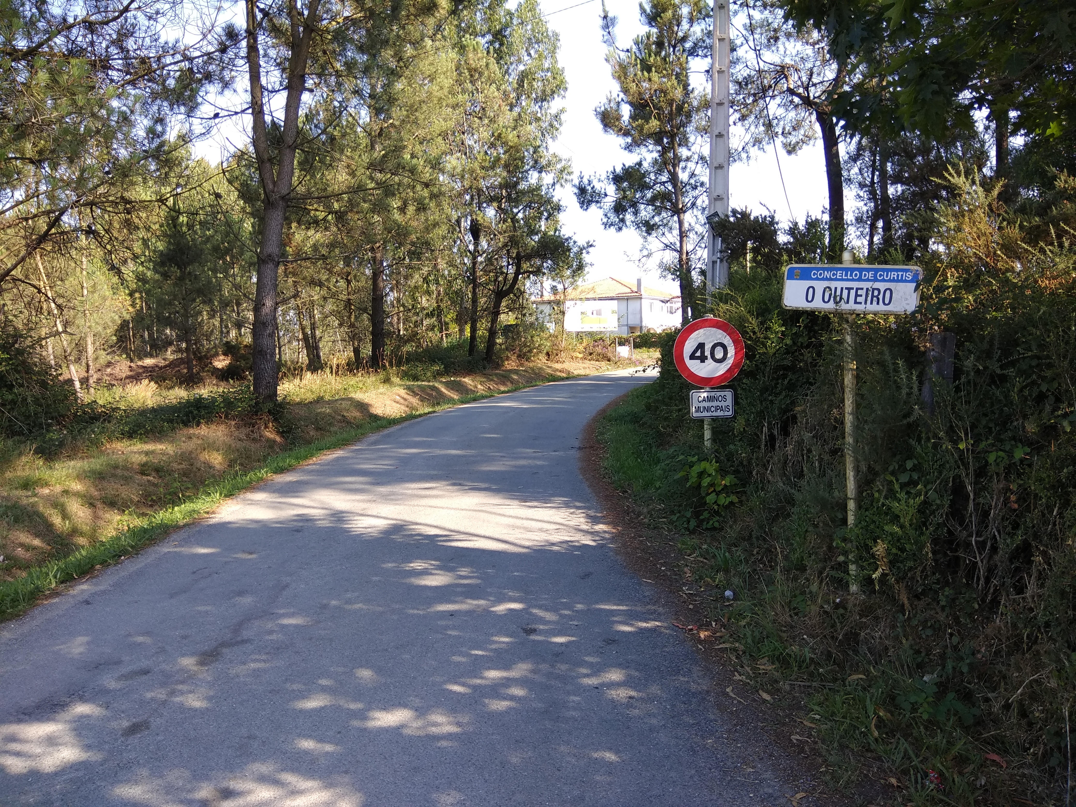 Vista do Outeiro, Curtis, Galiza.